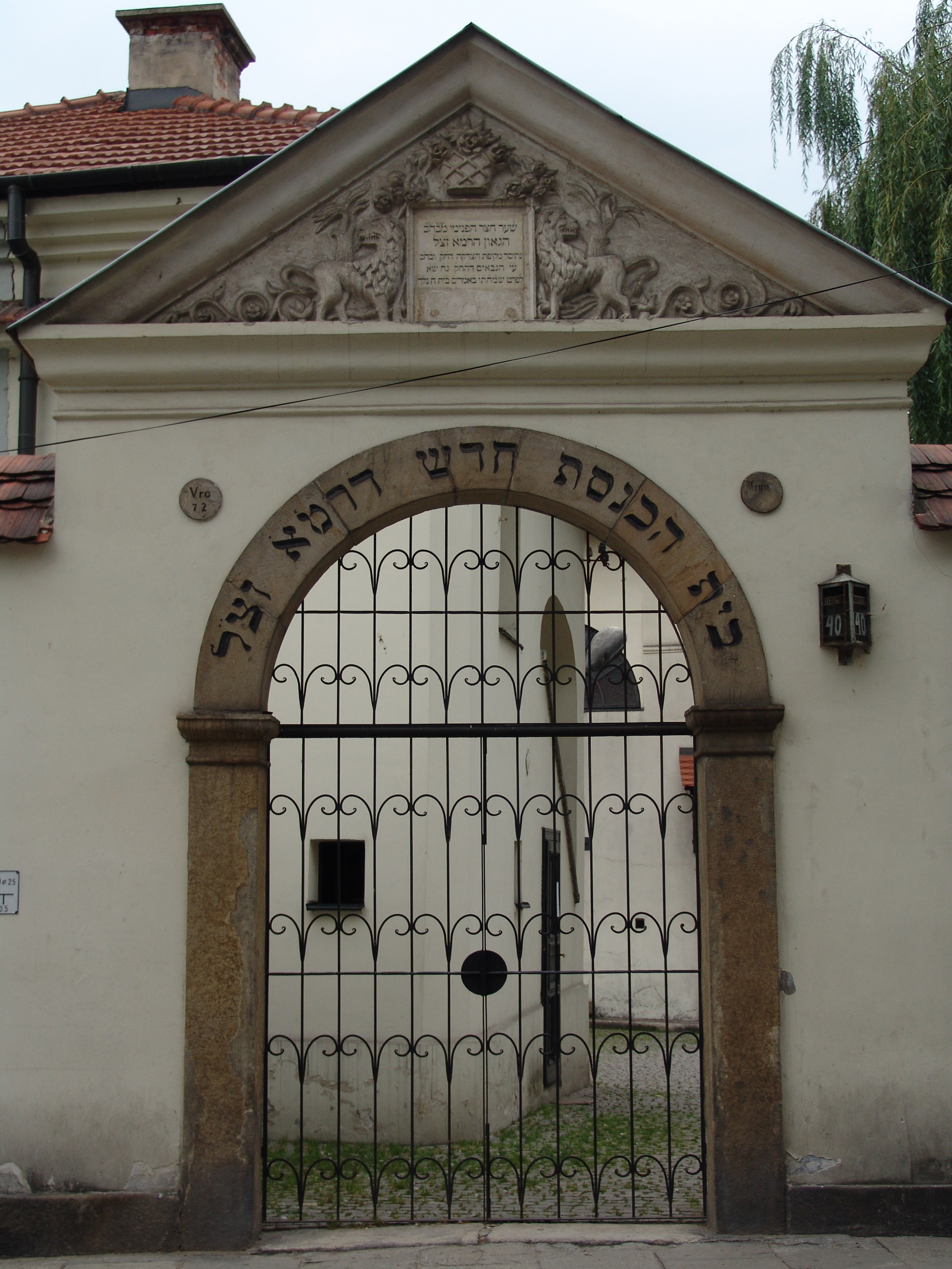 La synagogue REMUH dans la quartier Kazimierz (ancien quartier juif) de Cracovie en Pologne.